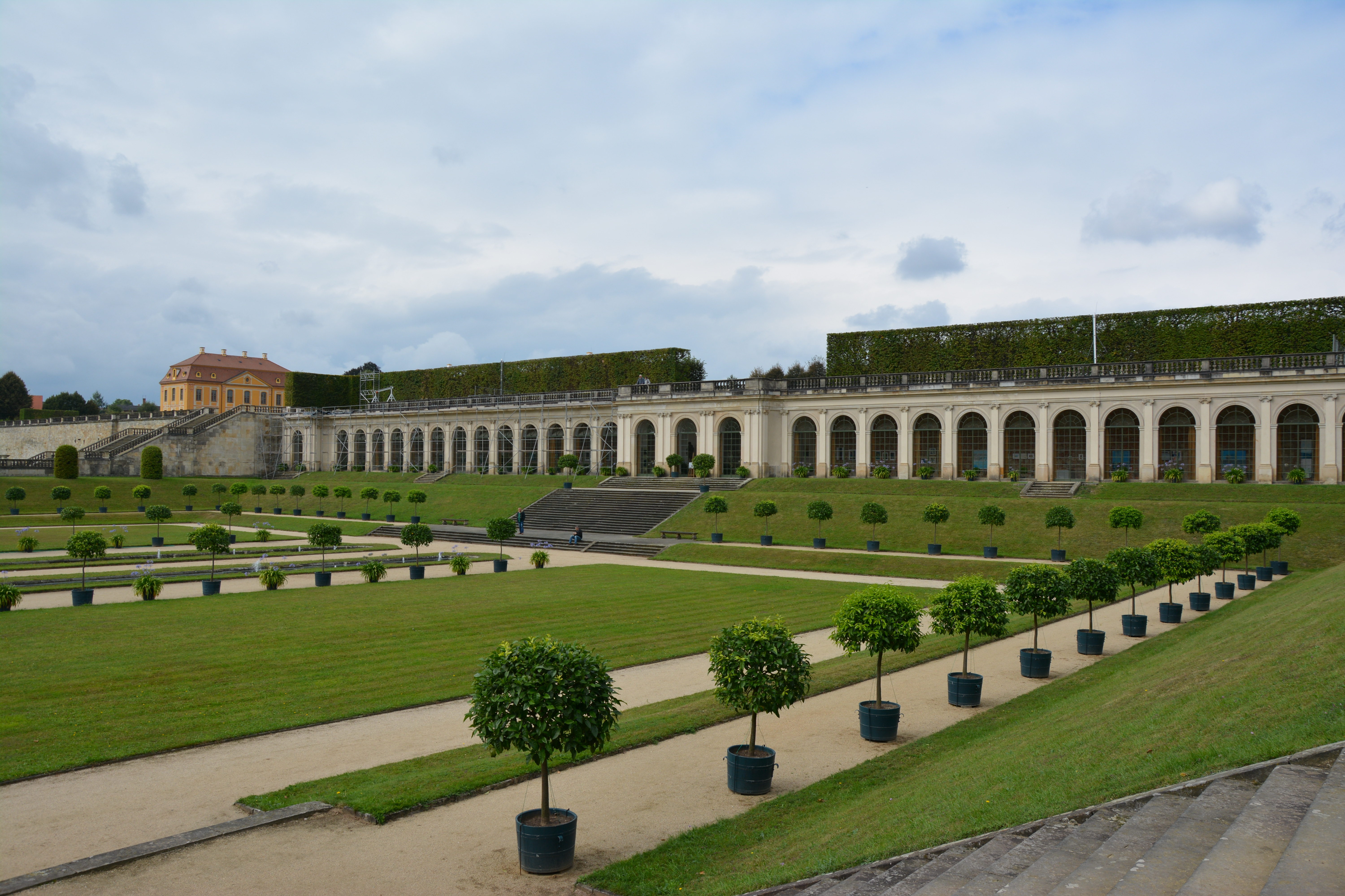 Barockgarten Großsedlitz, Untere Orangerie